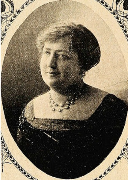 Ana Echazarreta Pérez Cotapos (Santiago, 1865 — Santiago, 25 de mayo de 1927) fue la cónyuge del Presidente de Chile Juan Luis Sanfuentes Andonaegui, y por consiguiente Primera Dama del país durante su mandato.